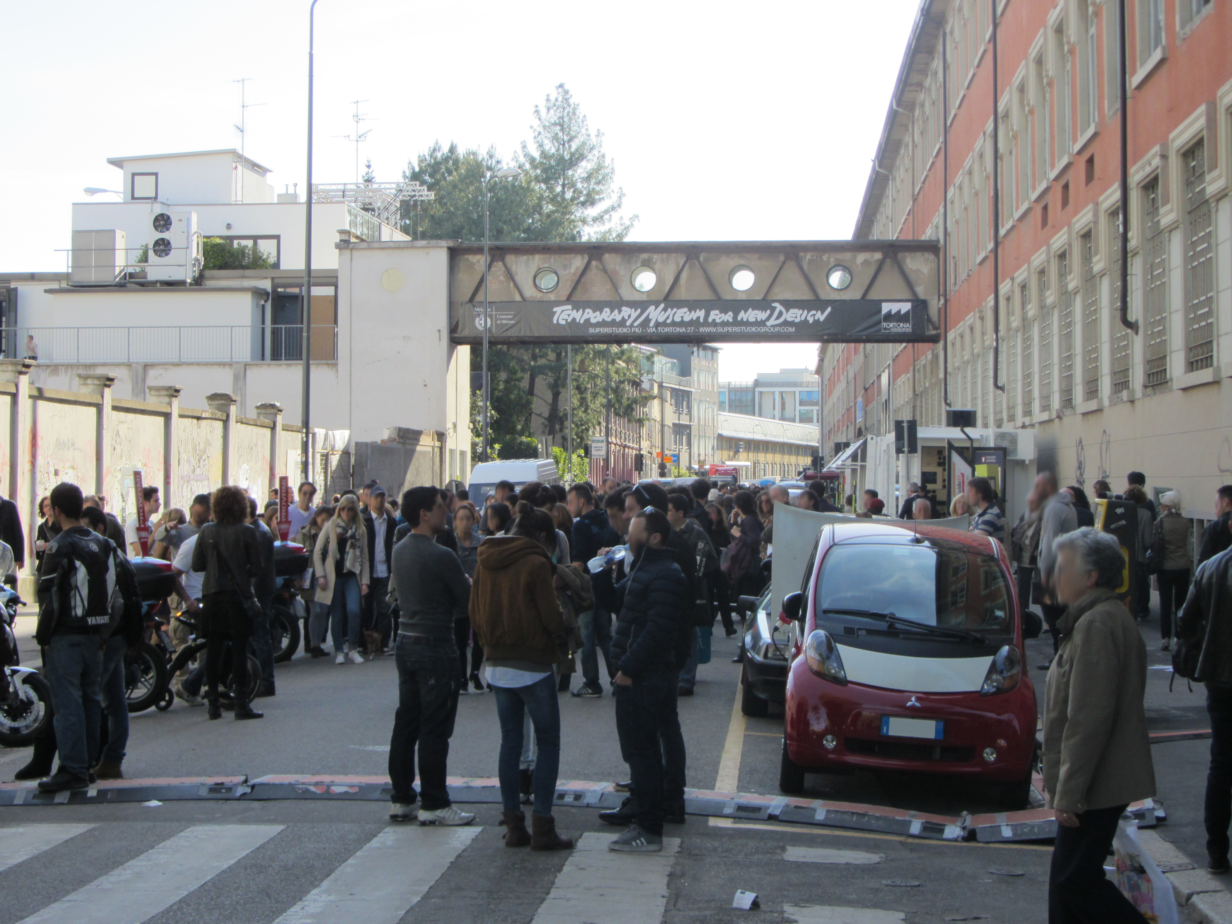 L'evento "Temporary Museum for new Design" al Supestudio Più in Zona Tortona durante il Fuorisalone 2012